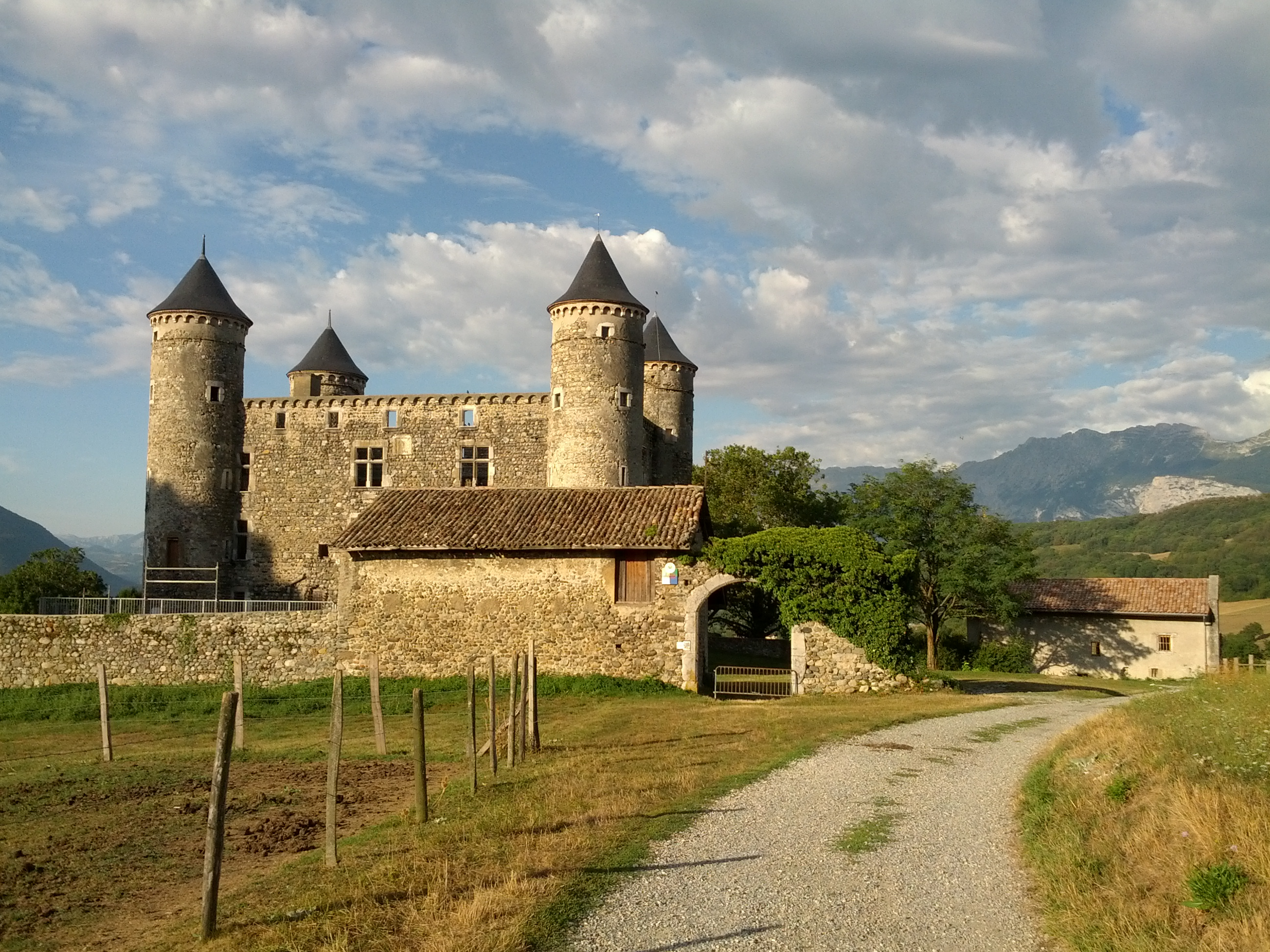 Château de Bon Repos . This photo was uploaded with Wiki Loves Monuments mobile 1.2.1 (Android).